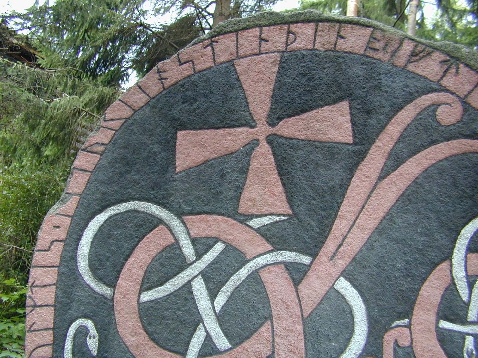 A runestone in Stockholm's Skansen open-air museum